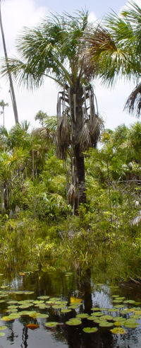 Beschreibung: Mauritia flexuosa aur der Insel Marajó Quelle: Fotographiert 2003 Fotograf: Frank Krämer Lizenzstatus: Public Domain